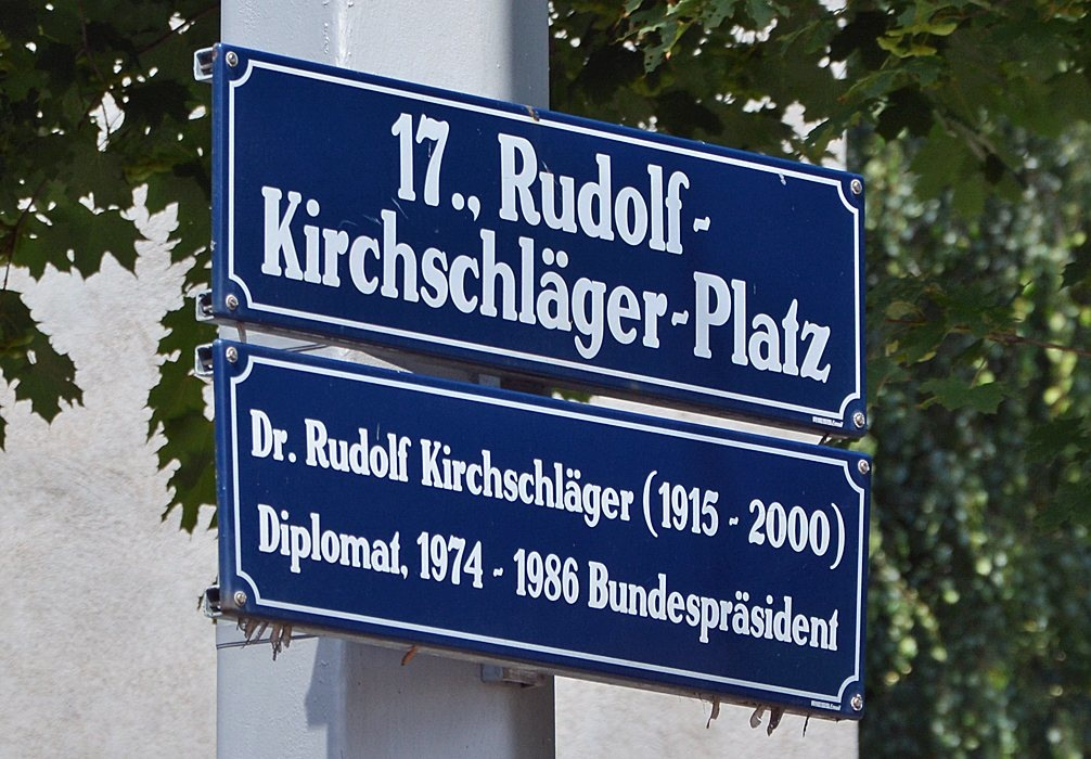 Nach Kirchschläger benannter Platz in Wien-Dornbach